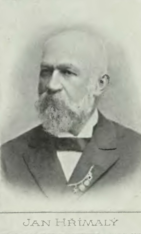 Portrét – Jan Hřímalý (1844-1915), Český houslista a hudební pedagog.